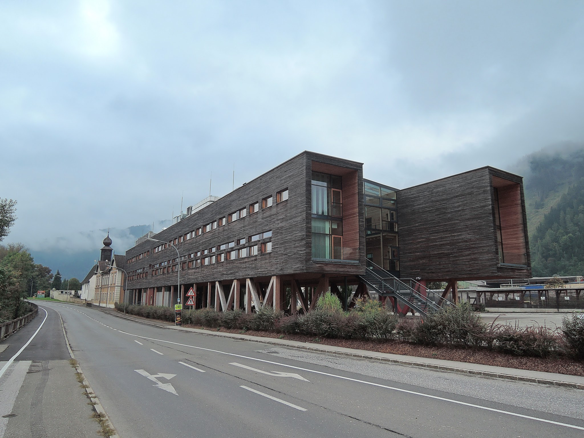 Leoben, Austria. Firmensitz des Holzverarbeiters Mayr-Melnhof in Leoben in der Turmgasse, erbaut 2008, Nussmüller Architekten ZT GmbH, Graz [1]